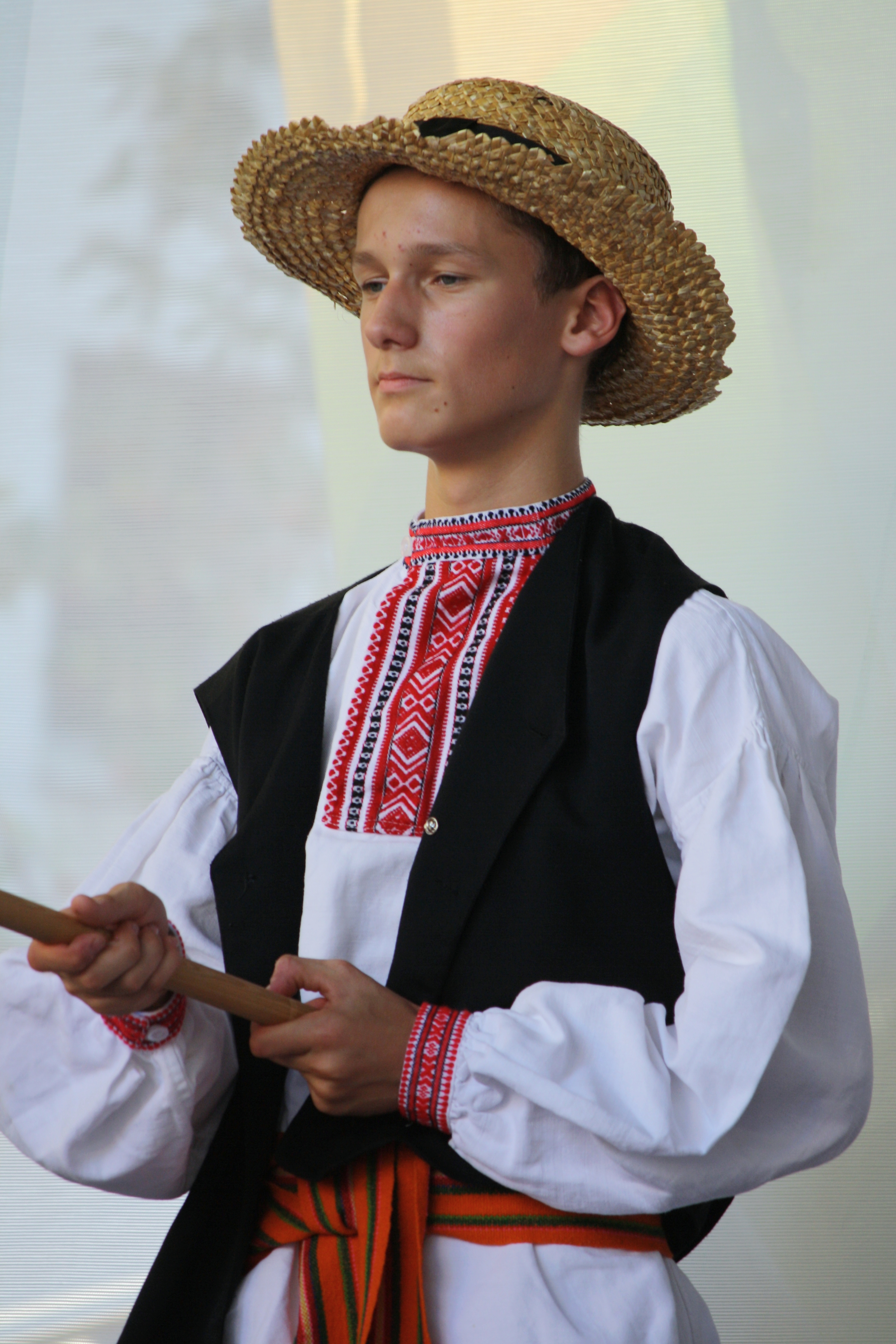 Pražský jarmark 2011 - z vystoupení polské folklórní skupiny INA